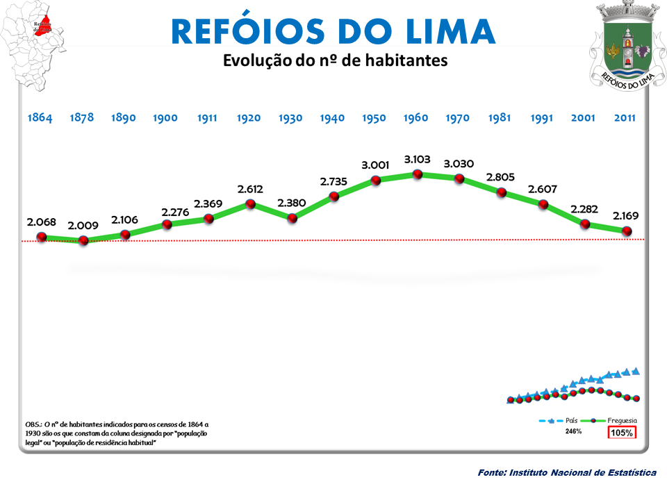 Cenos 1864/2011